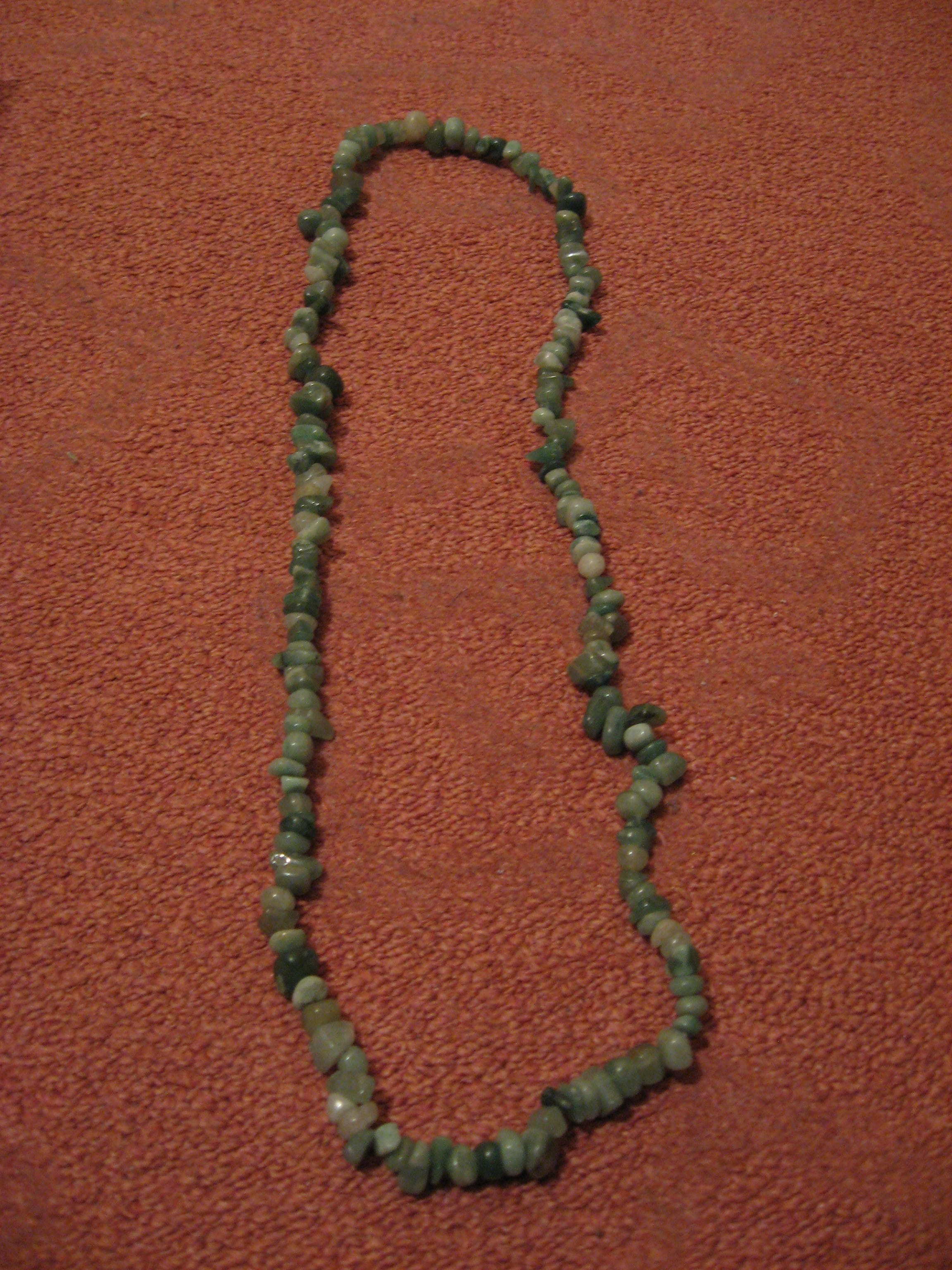 Огрлица.